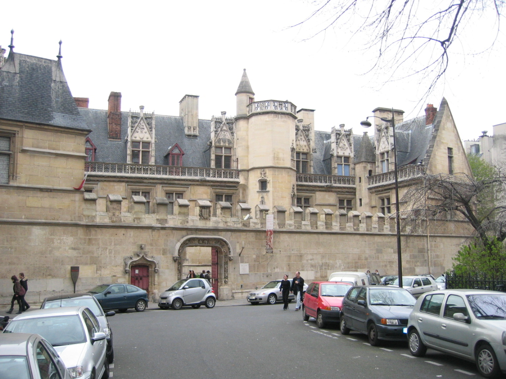 Musée & Hotel de Cluny - Paris